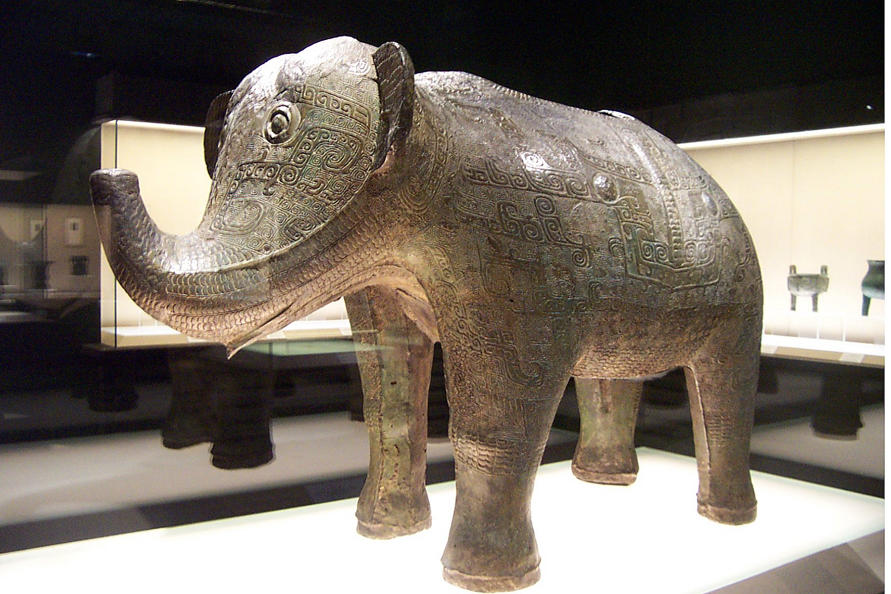 Bronze vinaire en forme d'éléphant Musée de Shanghai